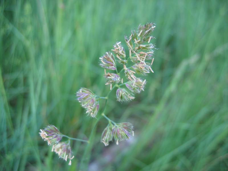 Gewöhnliches Knäuelgras Dactylis glomerata